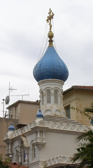 Фрагмент церкви Пресвятой Богородицы и Николая Чудотворца (Ментон)